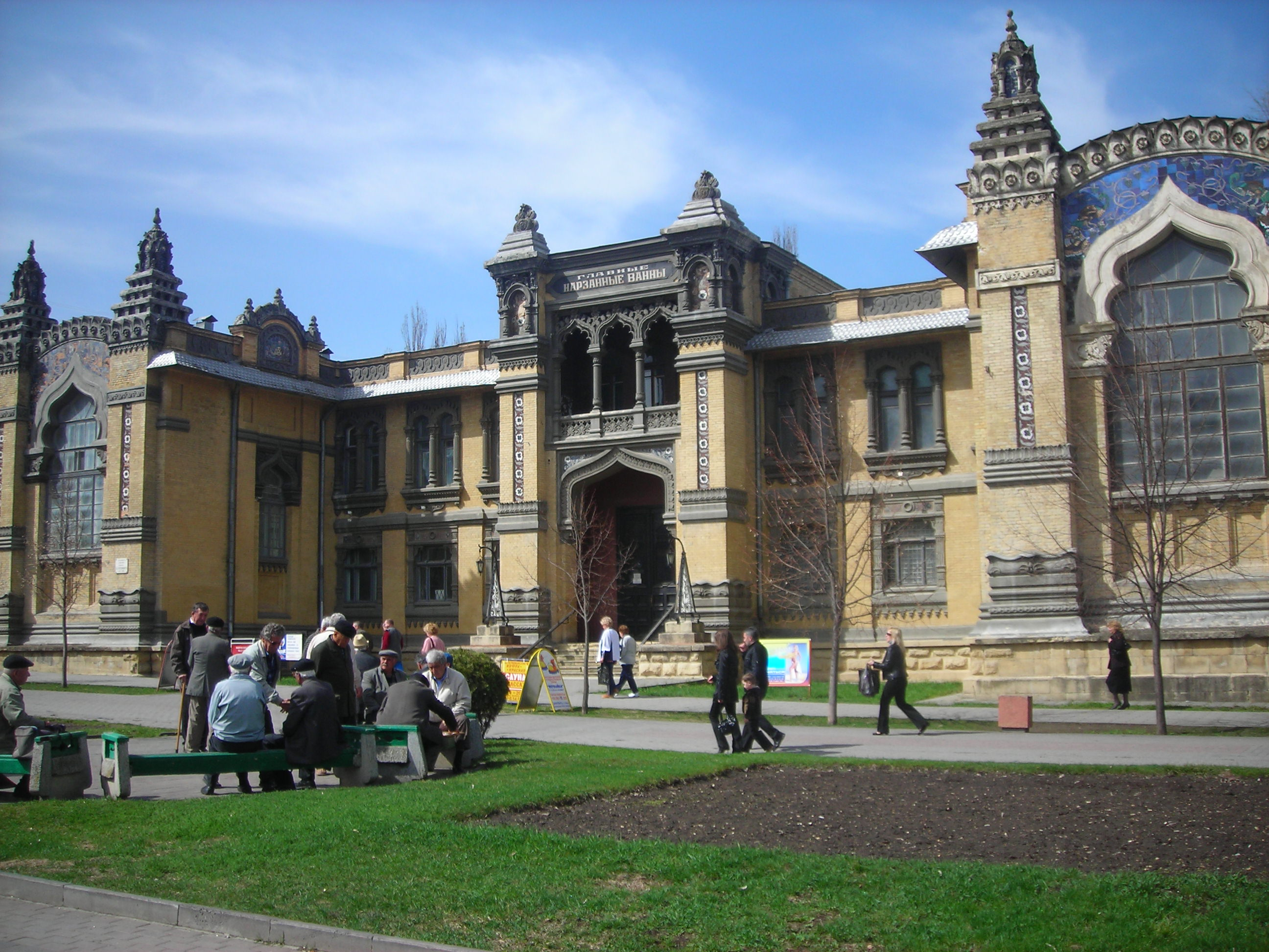 Narzan Baths in Kislovodsk